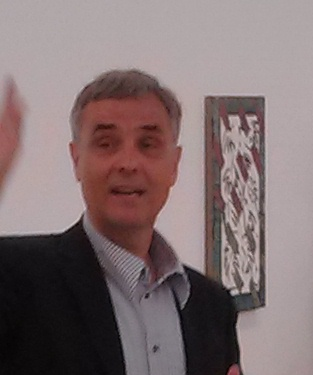 Guy Morin, 40 Jahre Ausstellungsraum Klingental